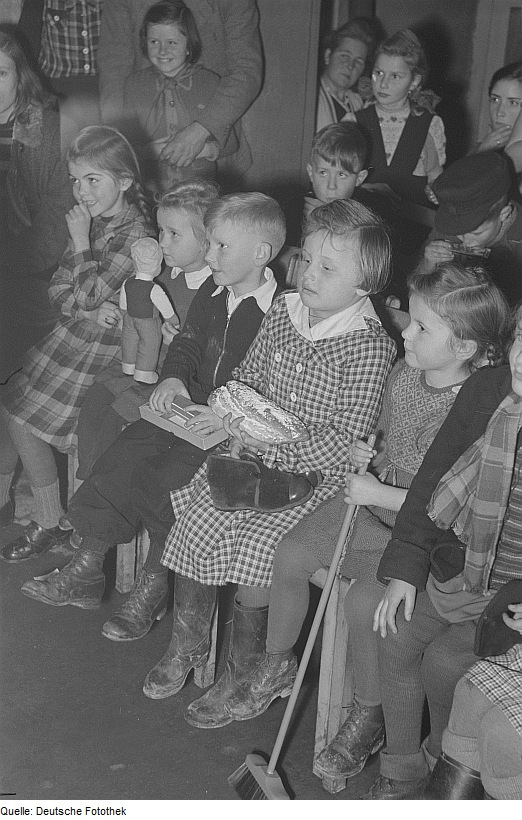 Original image description from the Deutsche Fotothek Kinder während einer Weihnachtsfeier